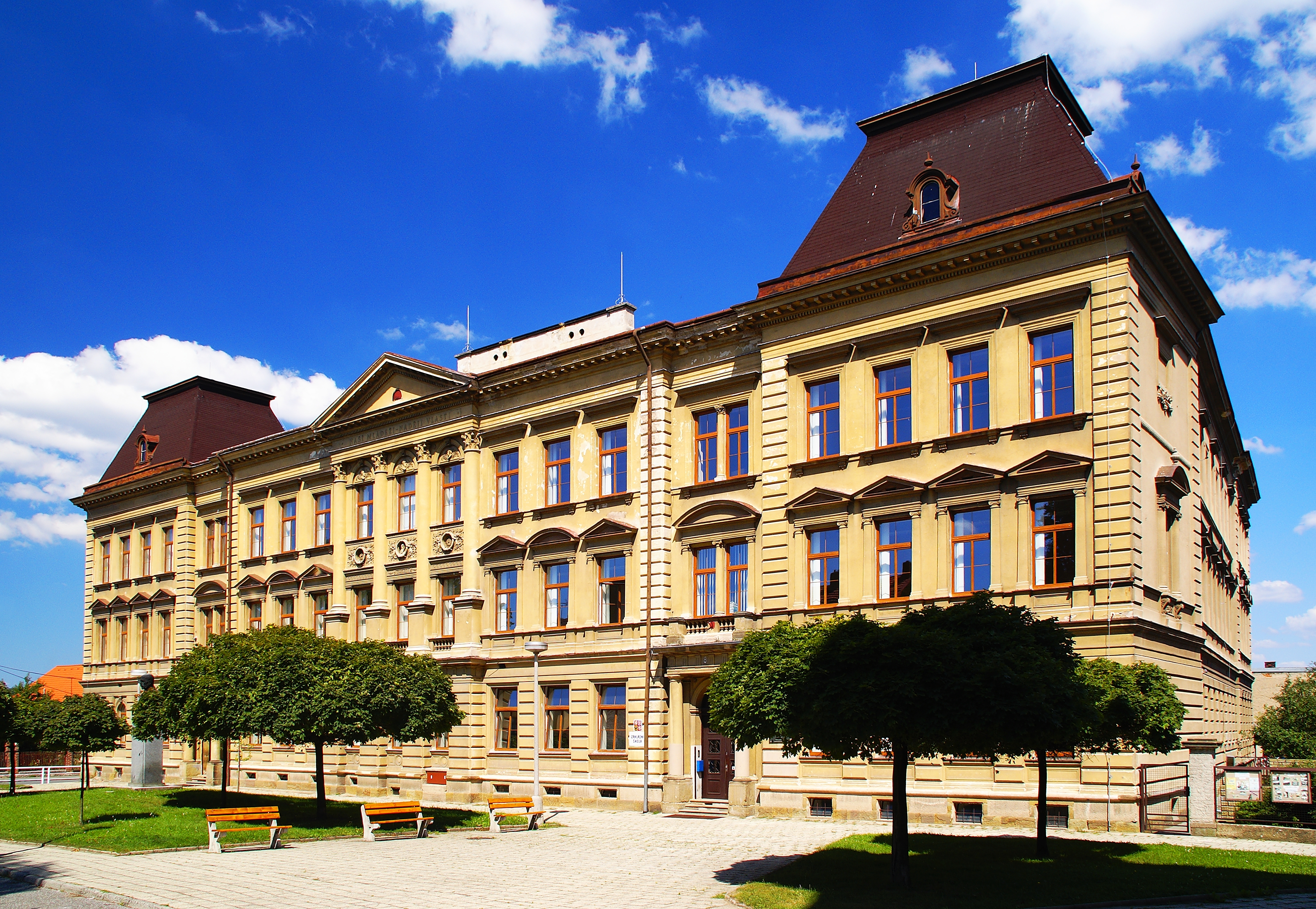 Novorenesanční školní budova v ulici Mistra Choceňského byla postavena v letech 1896 - 1897.